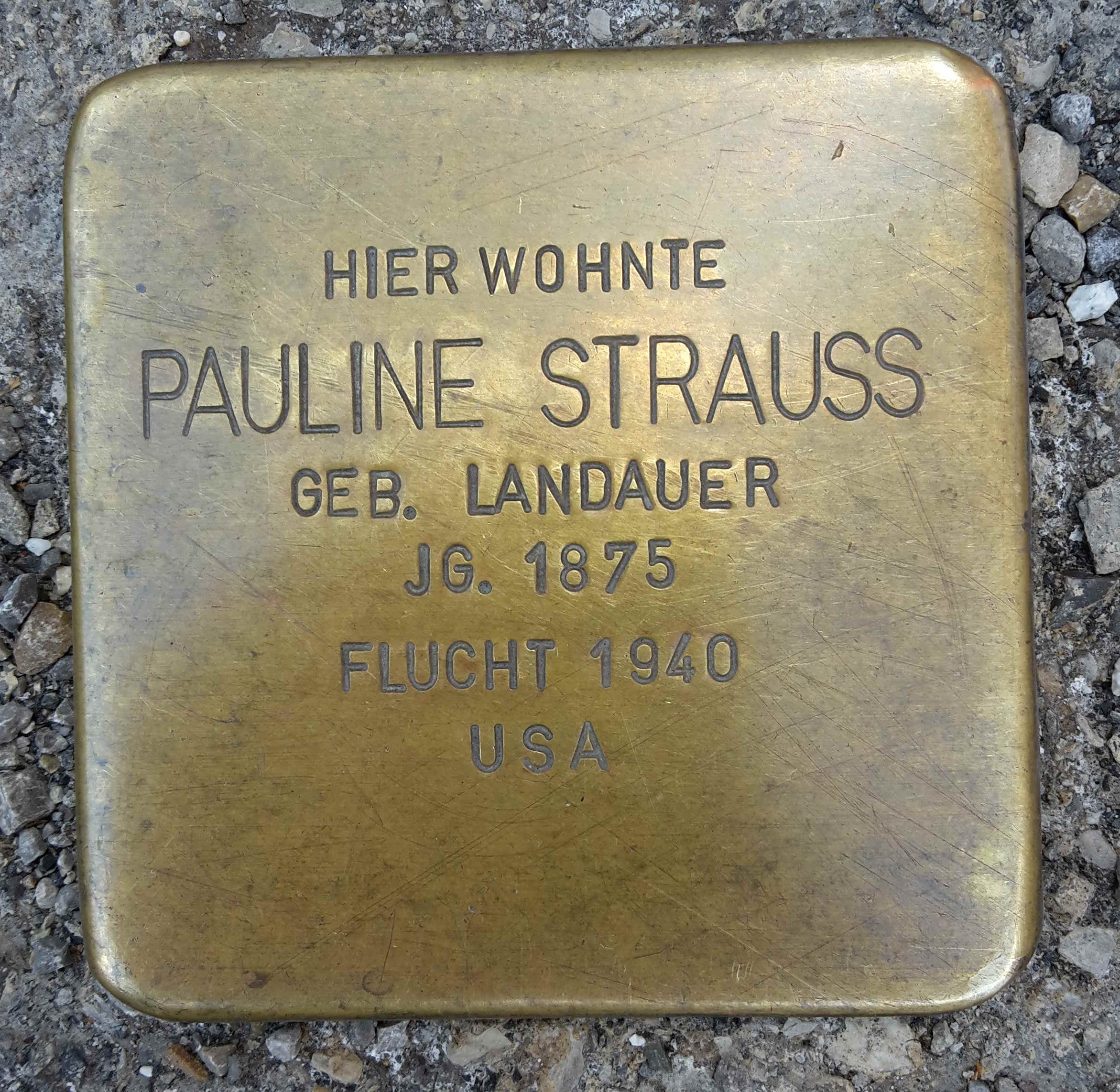 Stolperstein Neu-Ulm für Pauline Strauß